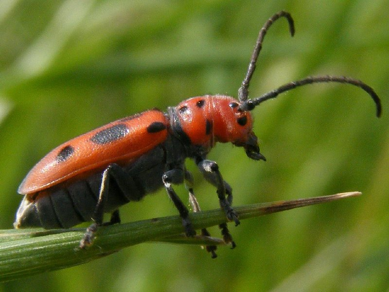 Longicorne de l'Asclépiade Tetraopes Tetrophthalmus